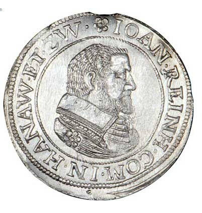 Pièce en argent (face) à l'efigie du comte de Hanau, sire de Lichtenberg Johann Reinhard Ier